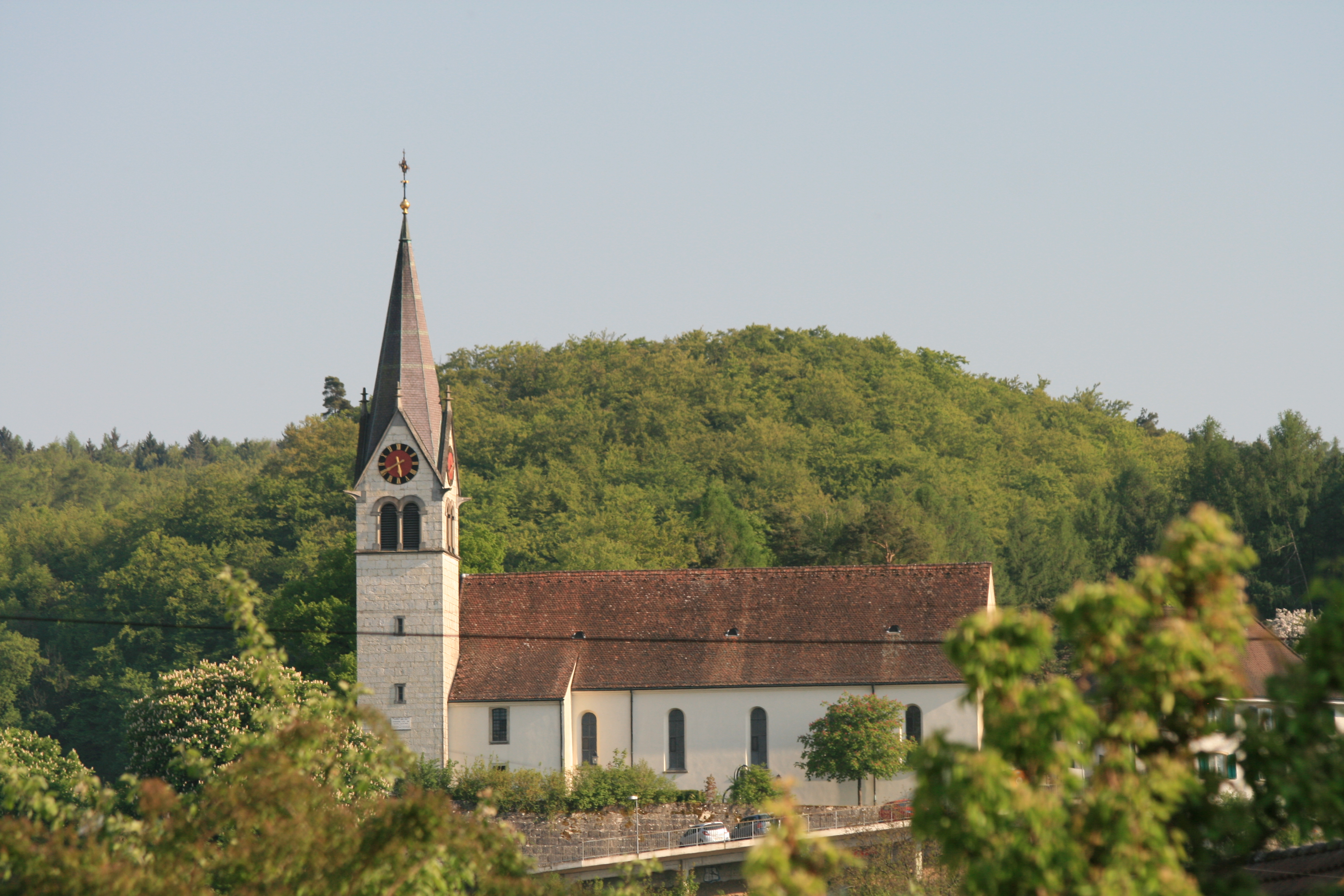 Kirche Würenlingen